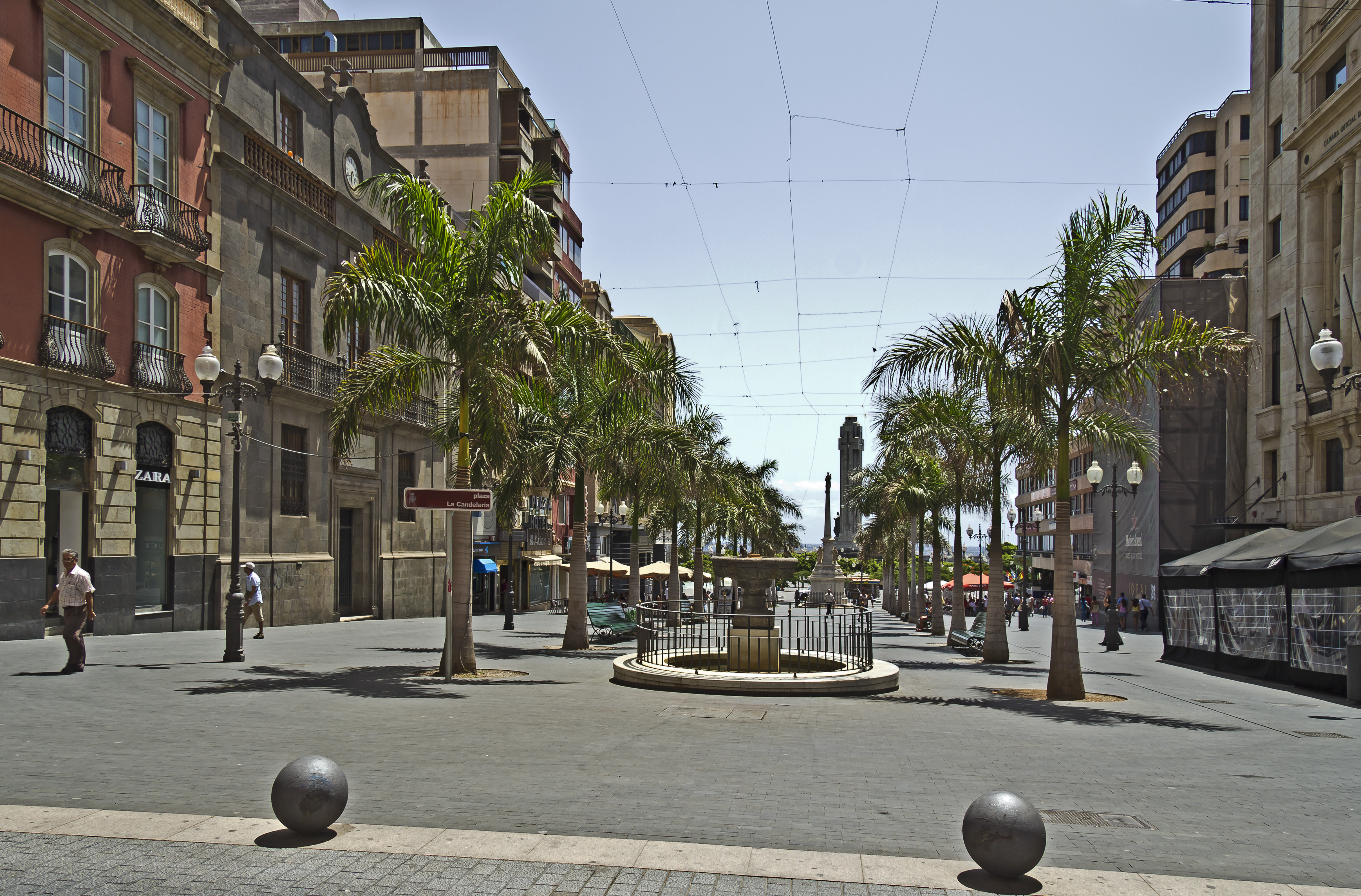 Plaza de la Candelaria in Santa Cruz de Tenerife